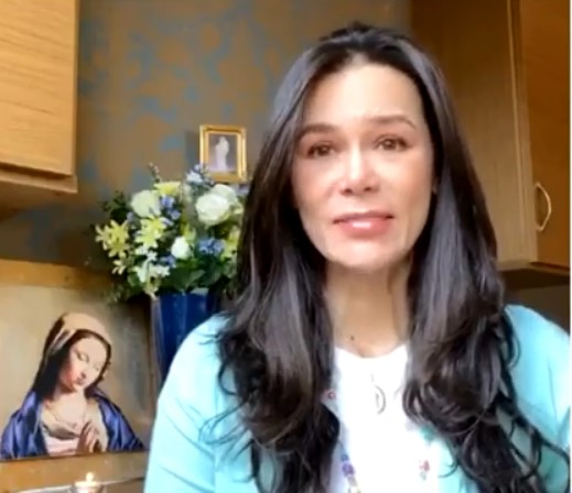 La ex-actriz y modelo Amada Rosa Pérez en entrevista virtual para Emisora Minuto de Dios en 2020